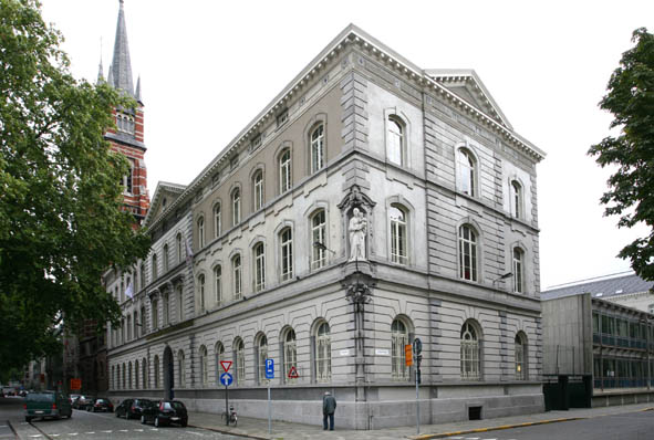 Antwerpen Frankrijklei 91